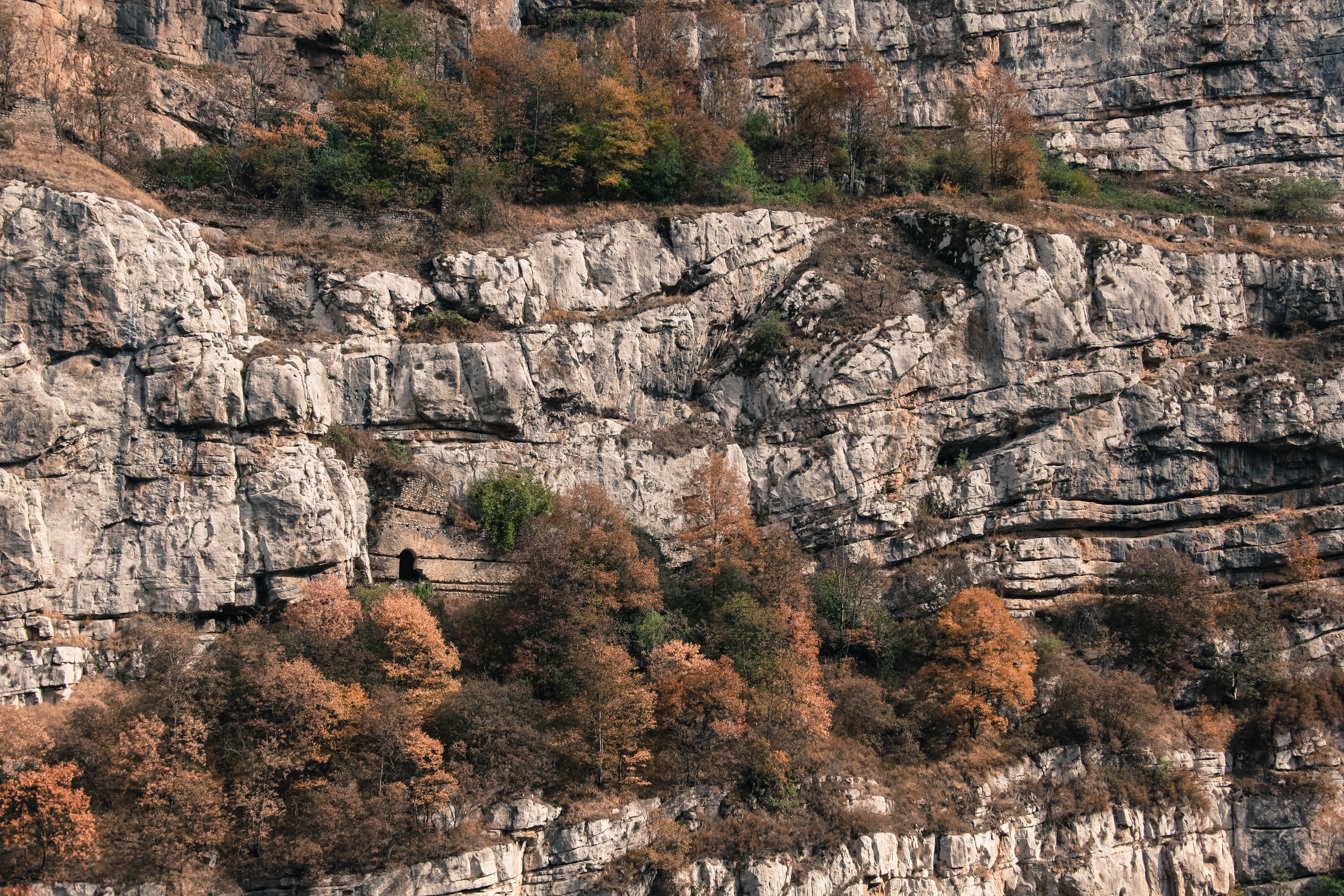 Şuşa mağara düşərgəsi